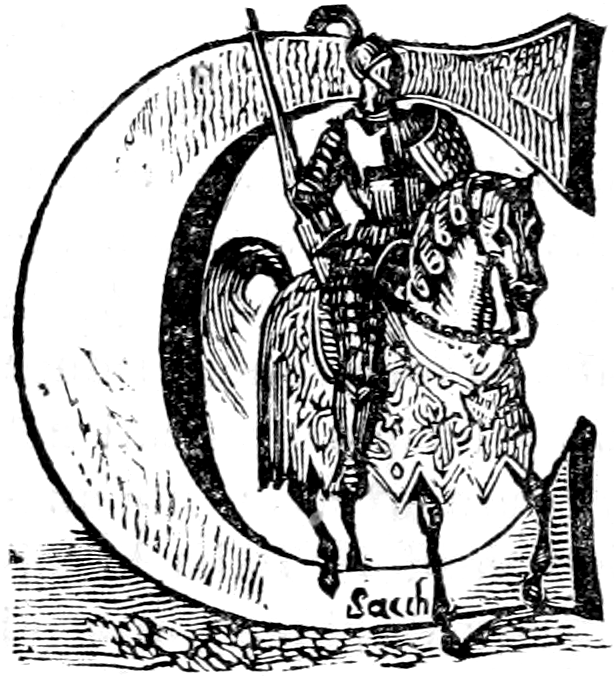 Illustrazione da Guerino detto il Meschino, di Andrea da Barberino, Milano, Tip. Guglielmini e Radaelli, 1841.